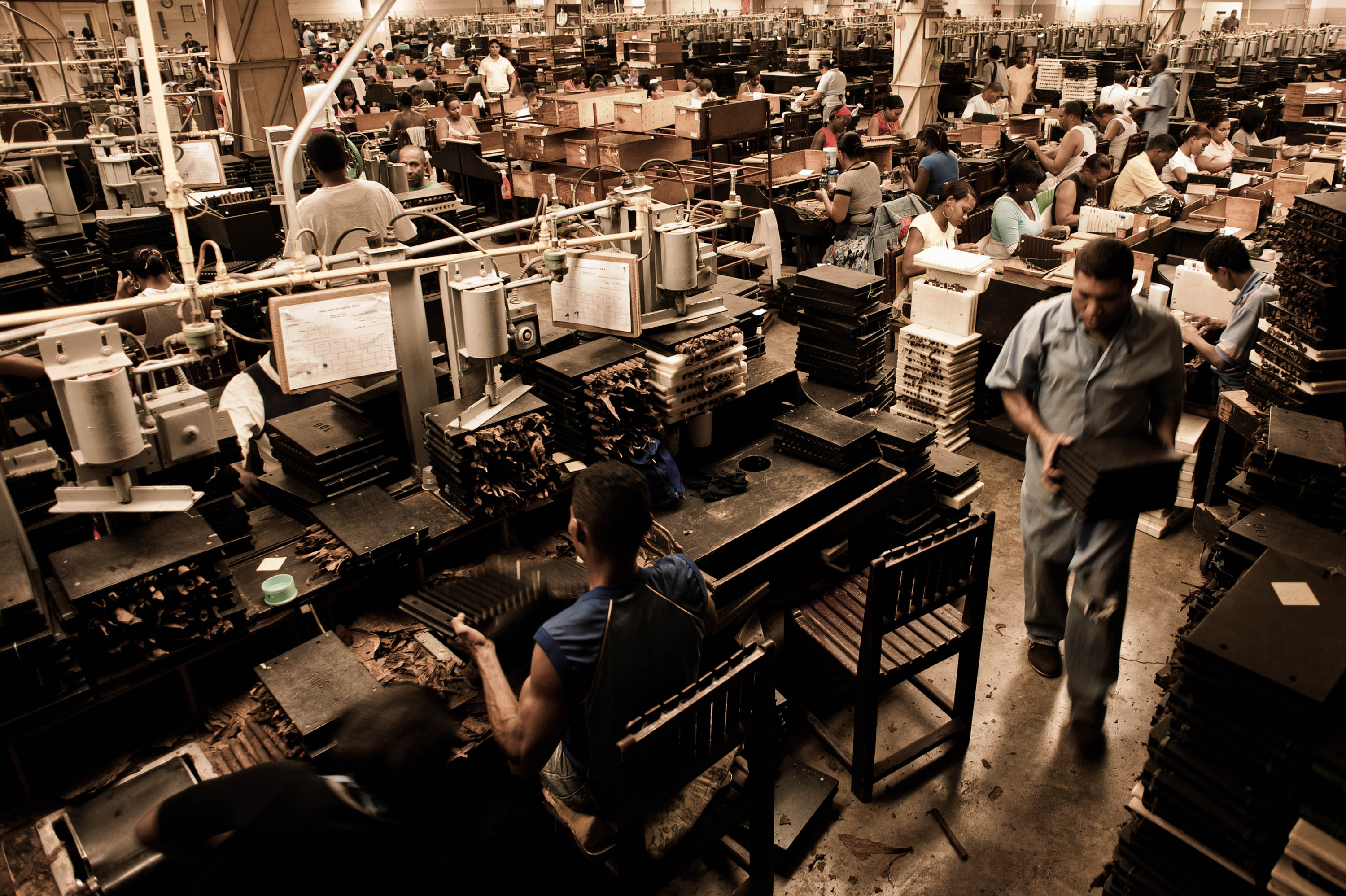 Keywords:Caribbean; Casa Del Campo; Cigar factory; Dominican Republic; La Romana; Домениканская республика; Карибские острова; Ла Романа; Фабрика Сигар Handmade cigar production, process. Shopfloor of Tabacalera de Garcia Factory. Casa de Campo, La Romana, Dominican Republic.